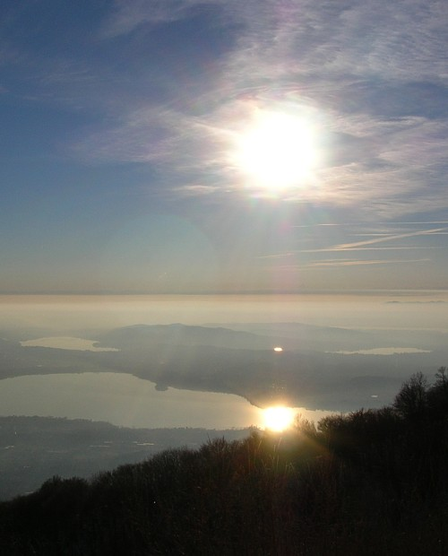 De Campo dei Fiori is een kalkmassief dat zich ten noorden van de Lombardische stad Varese verheft. Uitzicht hier vanaf het Belvedere